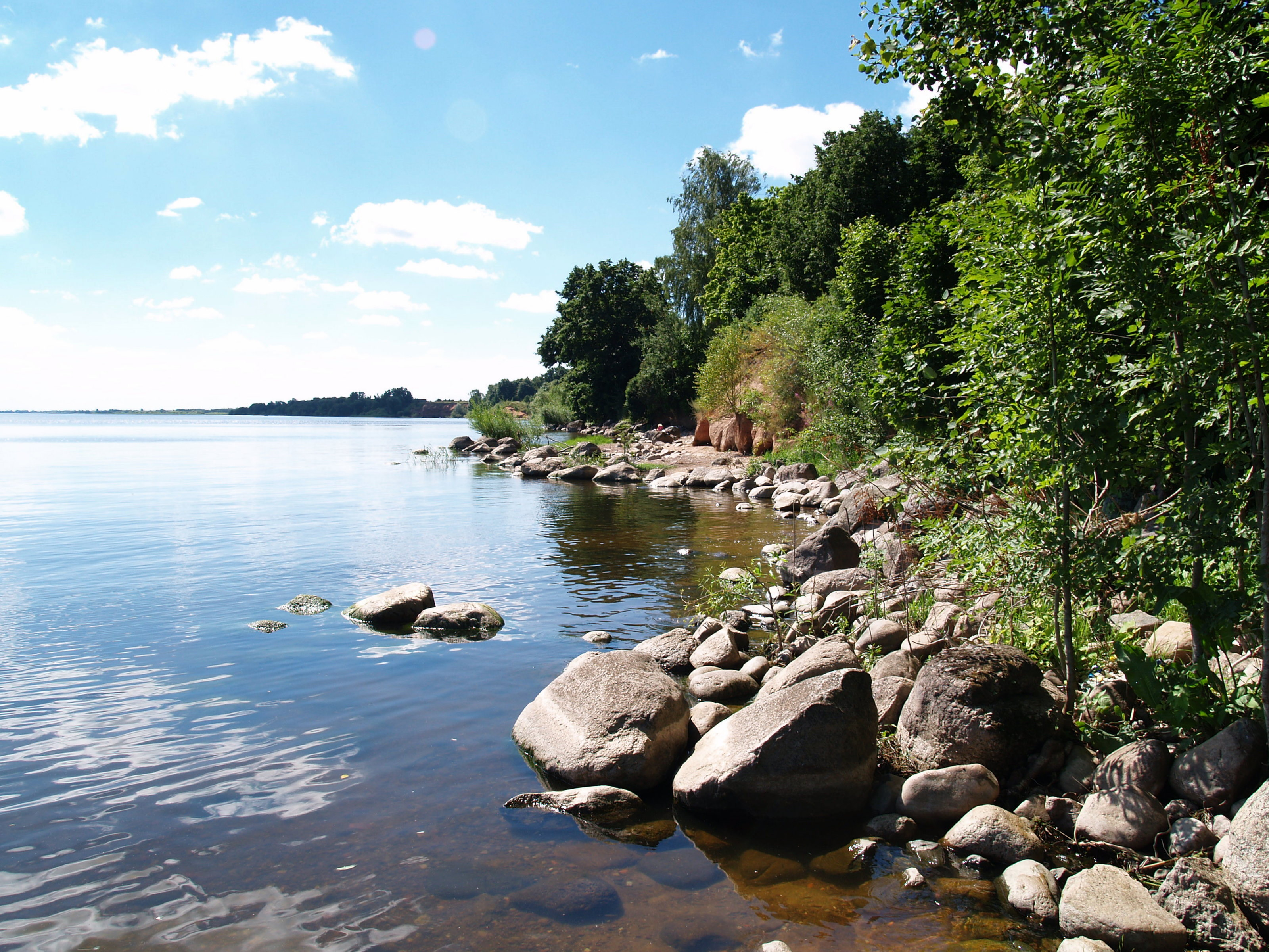 Peipsi järve rannik Kallaste juures. Lõiguti paistab Kallaste paljand.